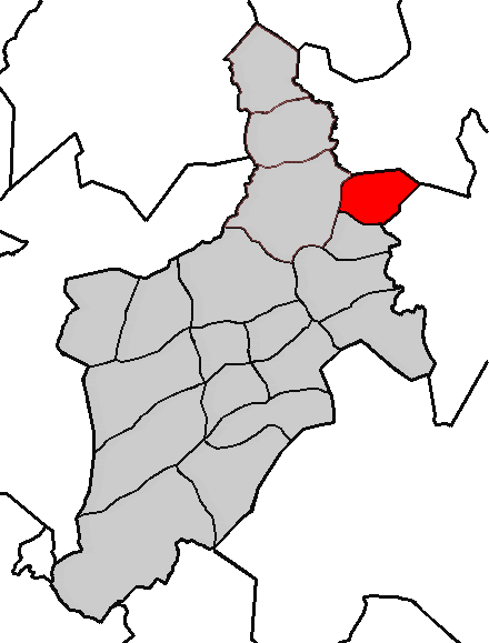 Situación da parroquia de Limiñón no concello de Abegondo